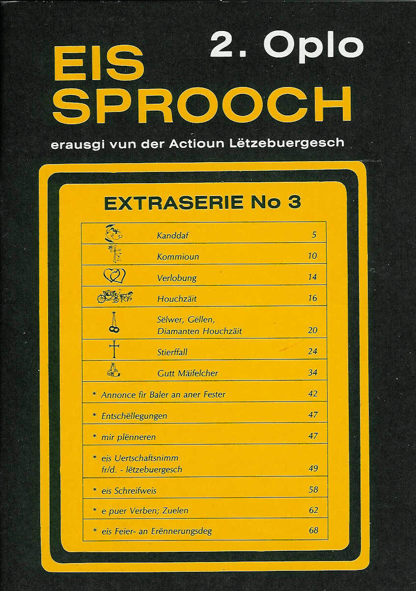 "Eis Sprooch Extraserie No 3"